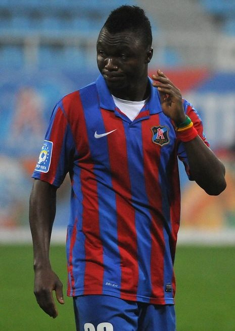 Домінік Адія — ганський футболіст під час виступів за ФК Арсенал Київ